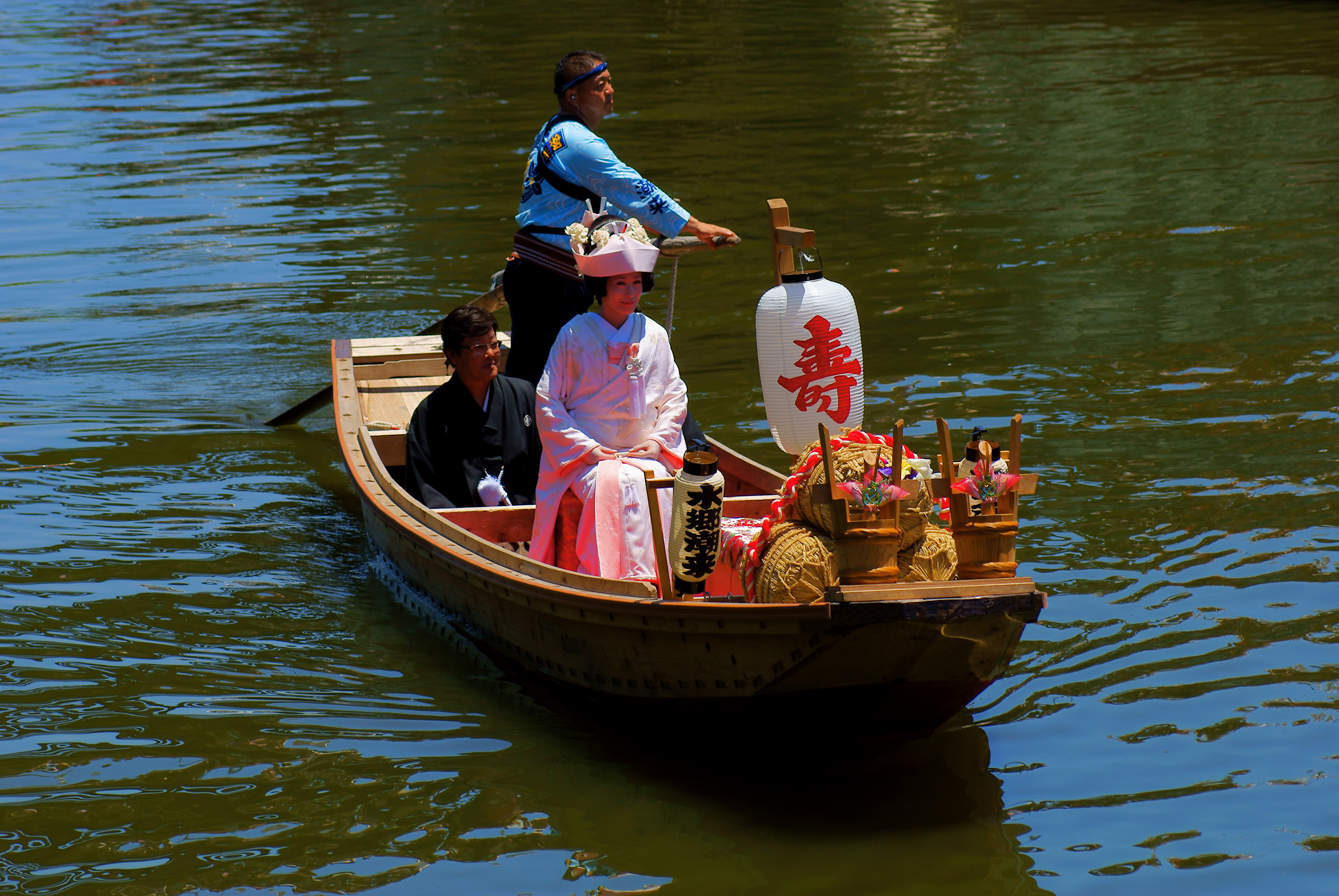 潮来あやめ祭りのハイライト、嫁入り舟の様子 【The wedding boat and bride of Itako】 In riverside district of Chiba and Ibaraki, bride is picked up on the Wedding boat and gets married in the case of marriage.